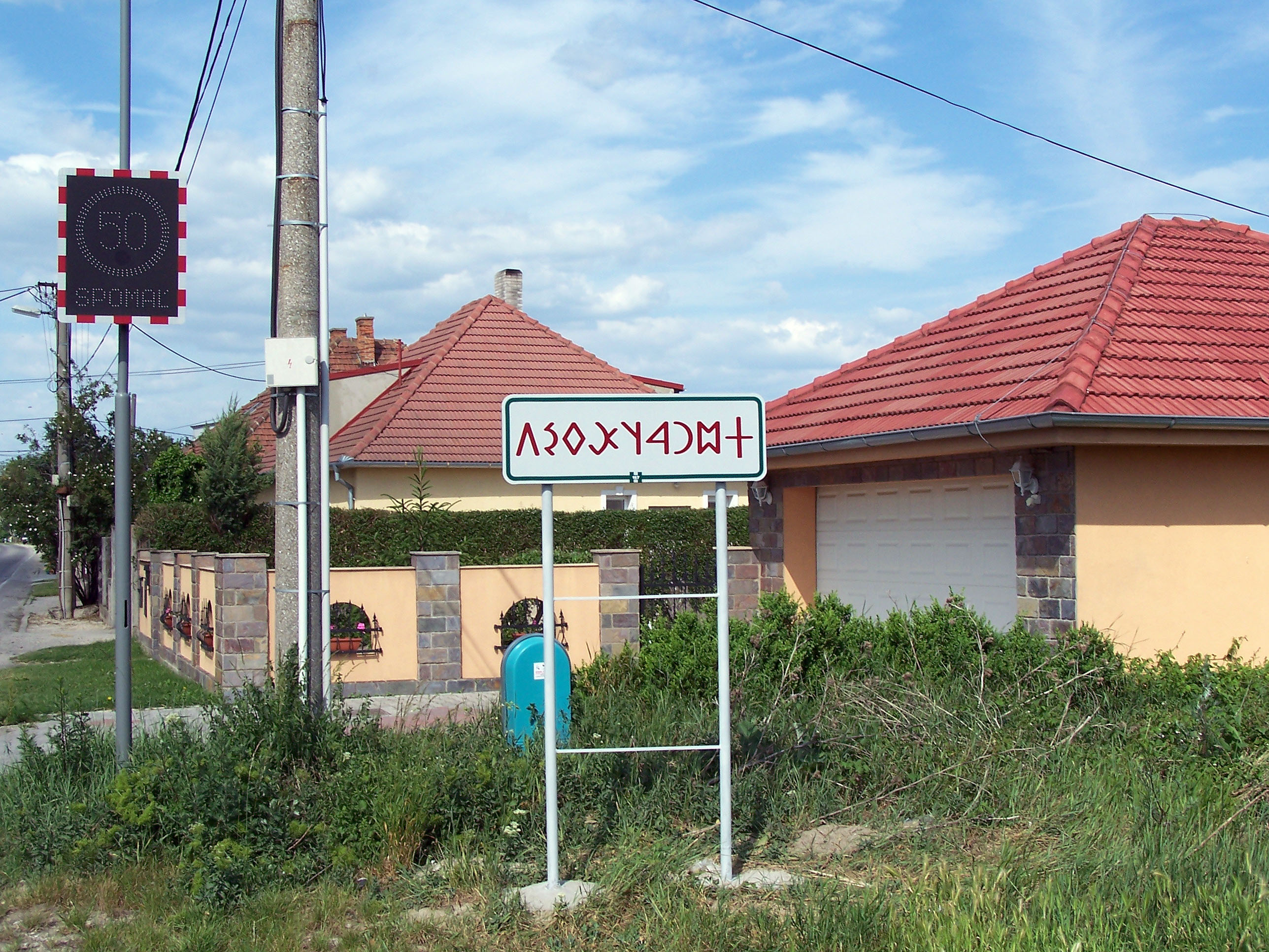 Welcome sign in Old Hungarian script in Dunajský Klátov (Dunatőkés), Slovakia